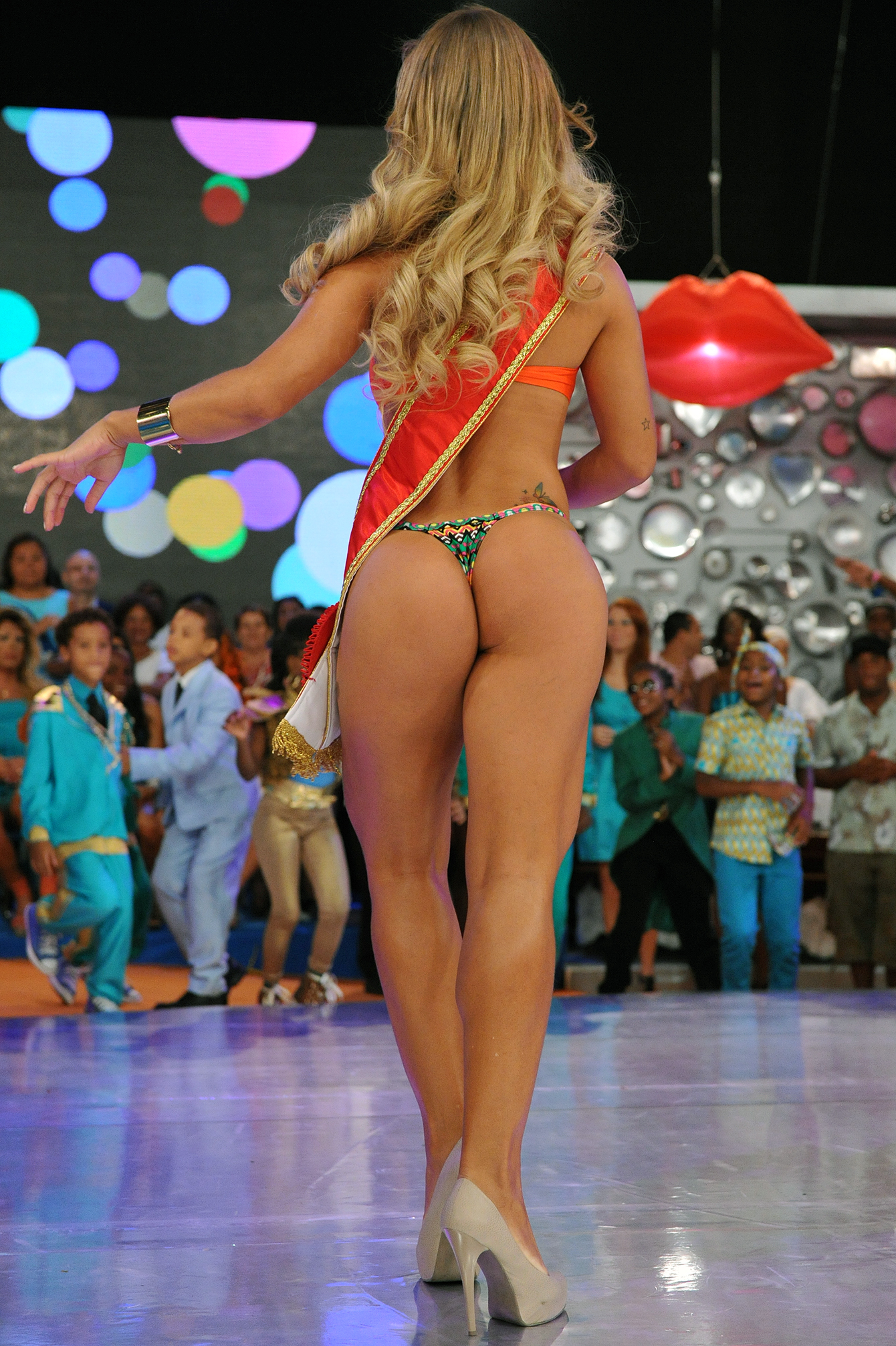 Se você jurar Me ensinar Sambalançar assim Eu lhe darei Uma sandália de prata Para você sambalançar Só prá mim